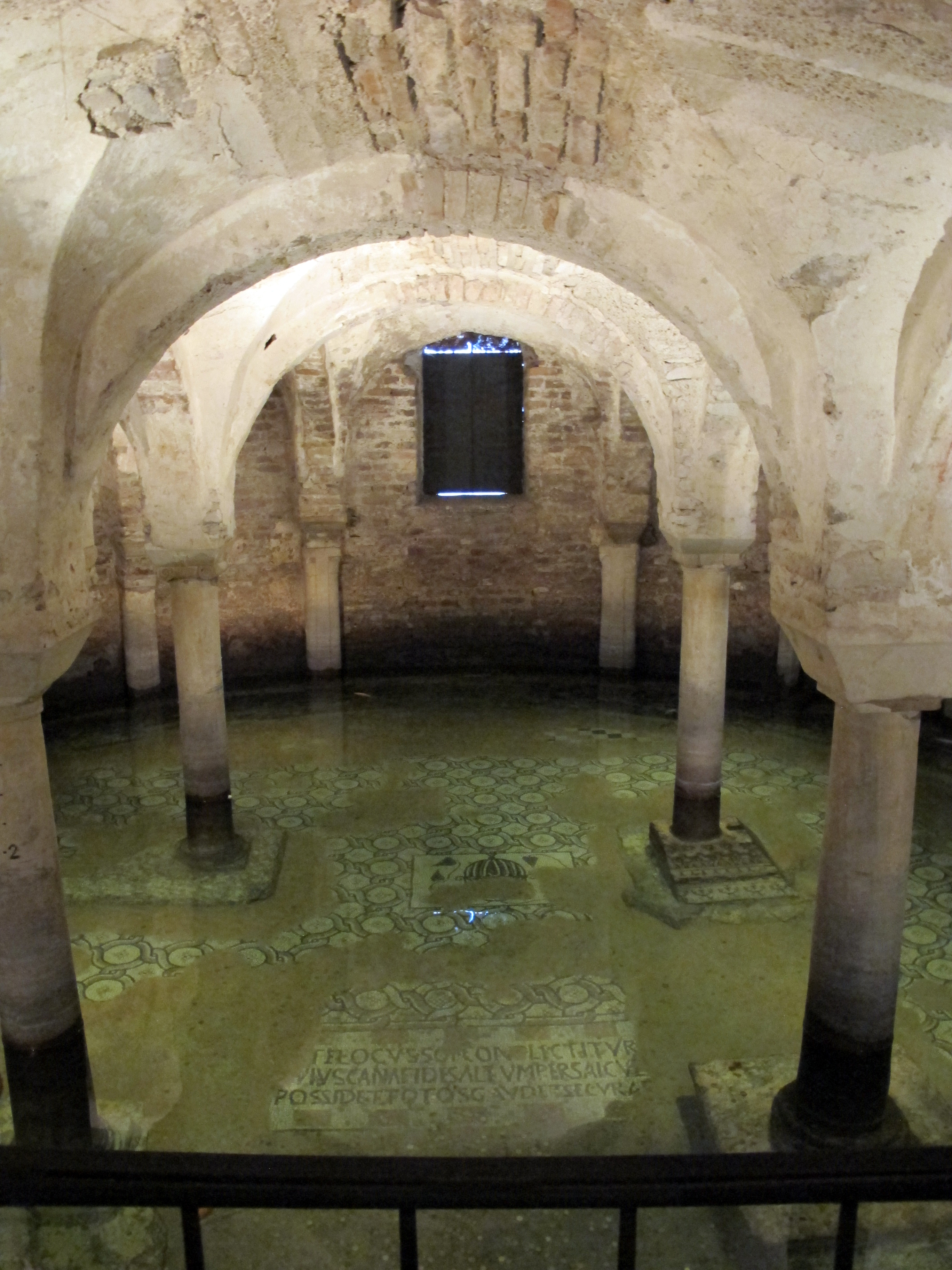 Ravenna, s. francesco, int., cripta del IX-X sec.